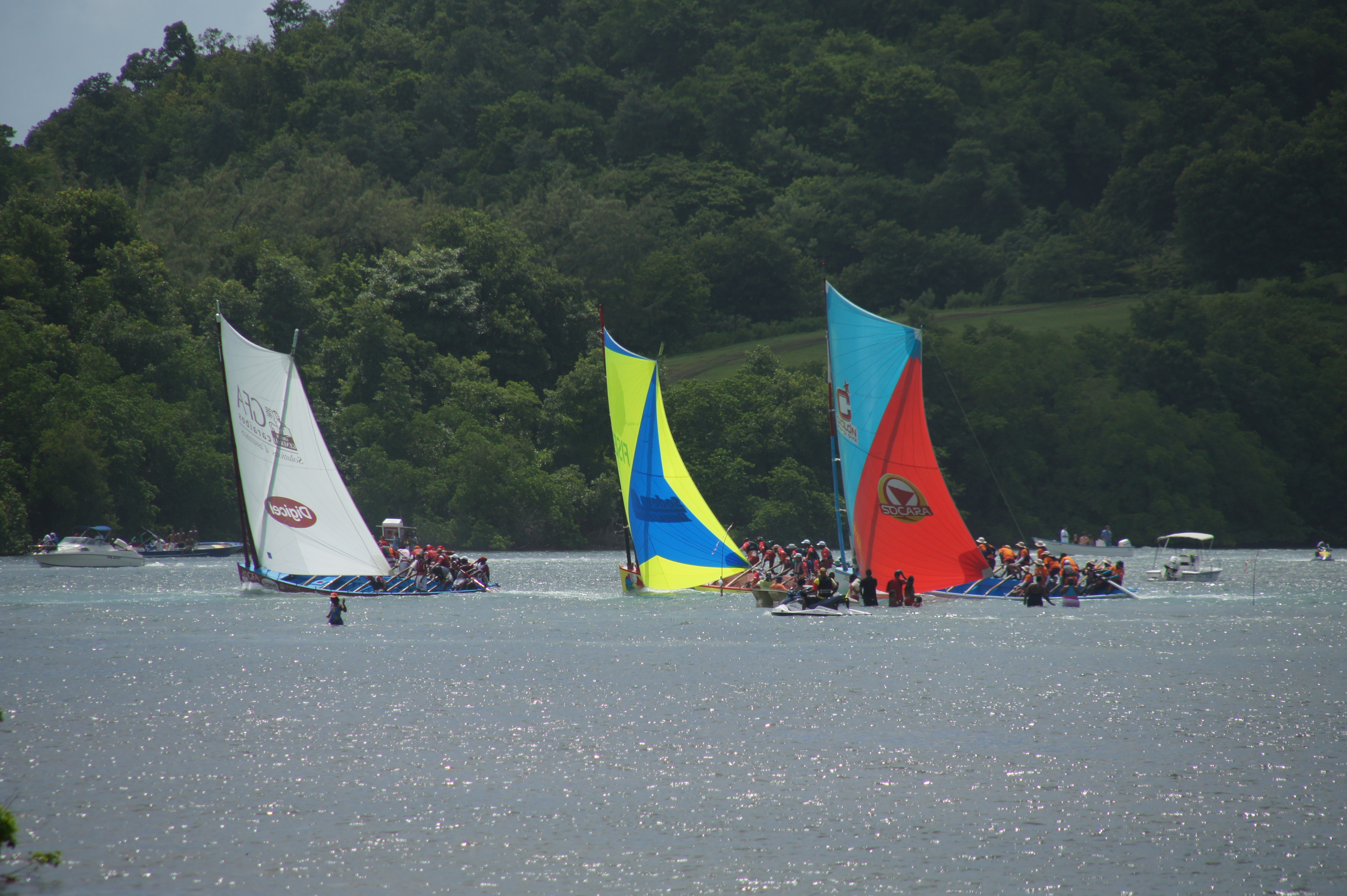 Tour de la Martinique des yoles, vue sur l'équipage pendant un tentative de dépassement.